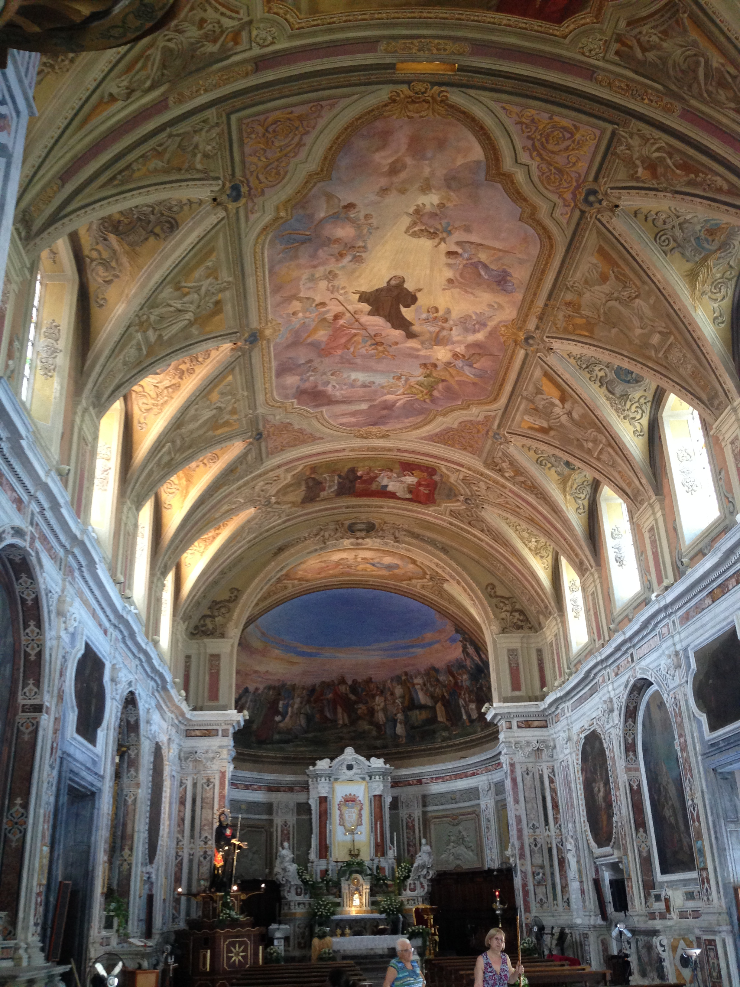 Interno della Chiesa di San Francesco di Paola